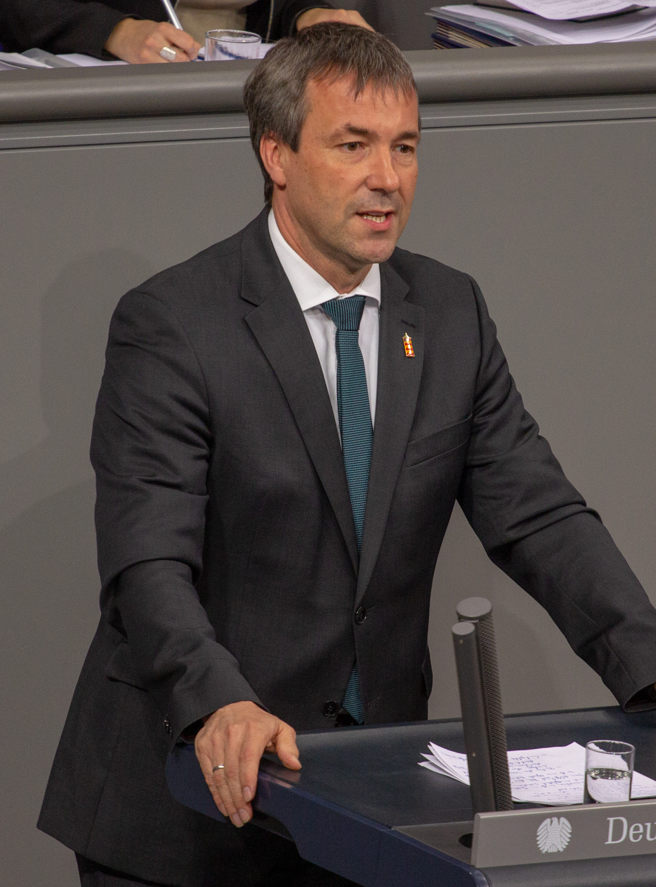 Johann Saathoff, Mitglied des Deutschen Bundestages, während einer Plenarsitzung am 11. April 2019 in Berlin.